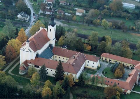 Búcsúszentlászló, Hungary, aerial photography. Szent László római katolikus templom